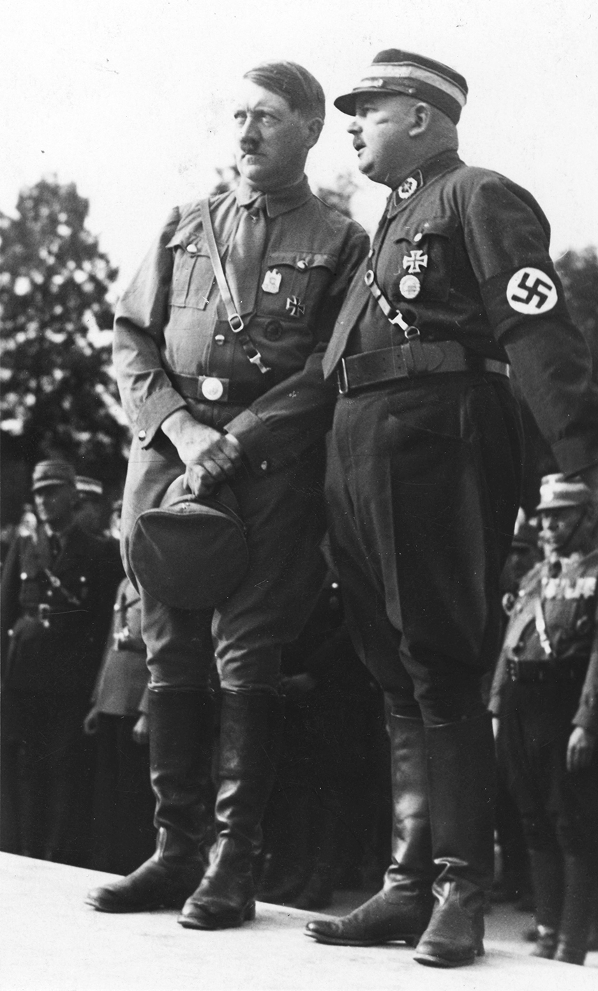 Nürnberg, Reichsparteitag 1933. Adolf Hitler und Stabschef Röhm. Information added by Wikimedia users.Nürnberg.- Reichsparteitag; Adolf Hitler & Ernst Röhm (SA-uniform) Gespräch, 30. August - 3. September 1933